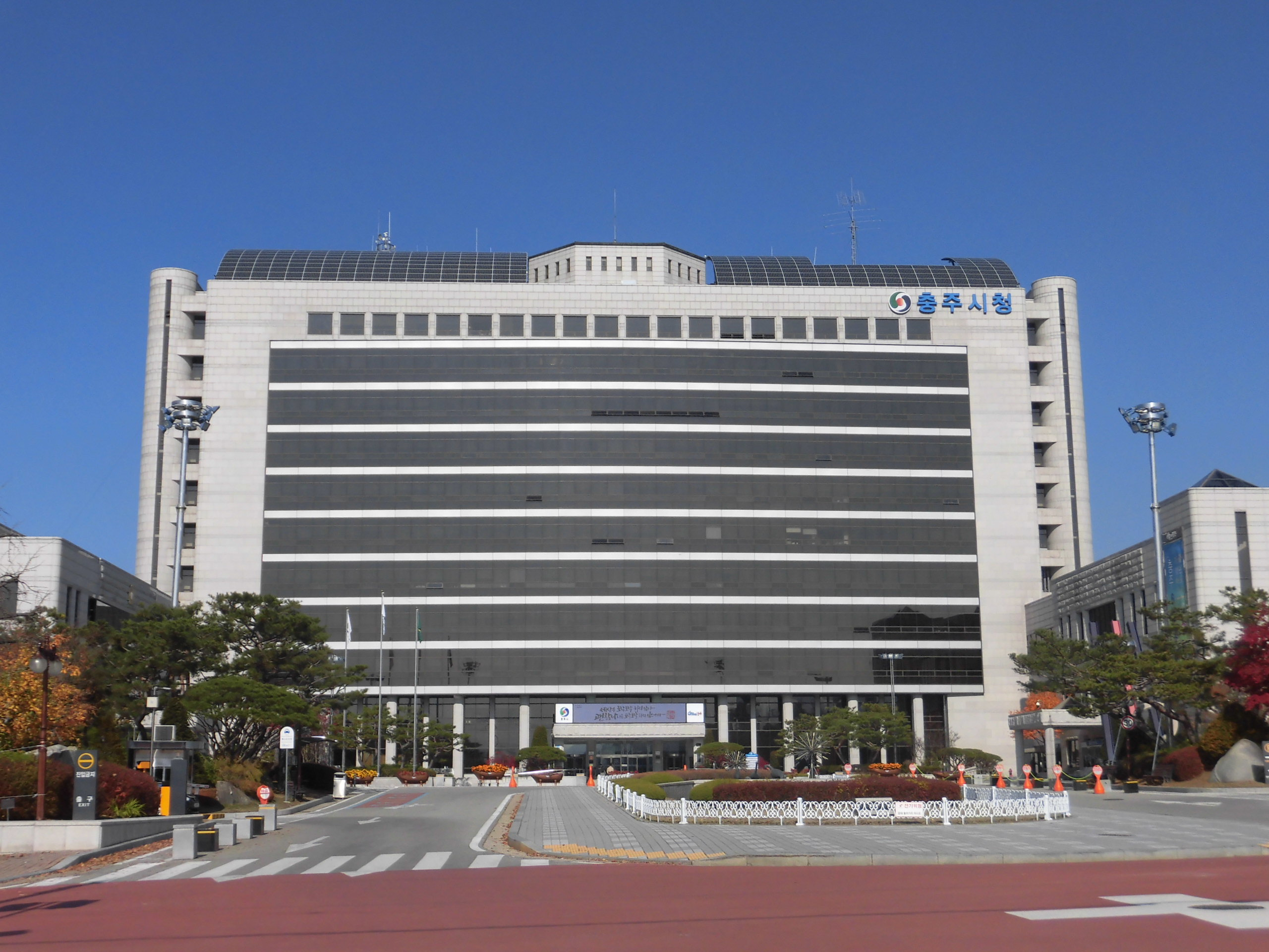 충청북도 충주시에 있는 충주시청